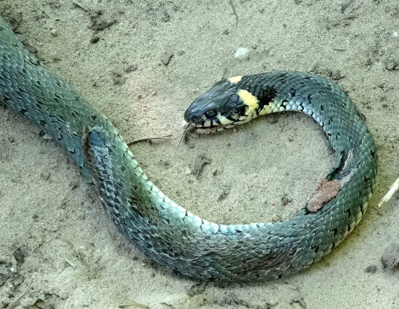 Wczesnośredniowieczne grodzisko Talerzyk w Topolnie, VIII - XI wiek, na zboczu Doliny Dolnej Wisły, zaskroniec zwyczajny na drodze do grodziska